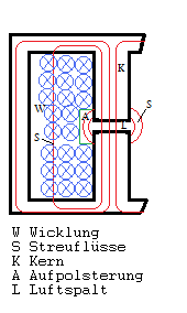 Streufluss